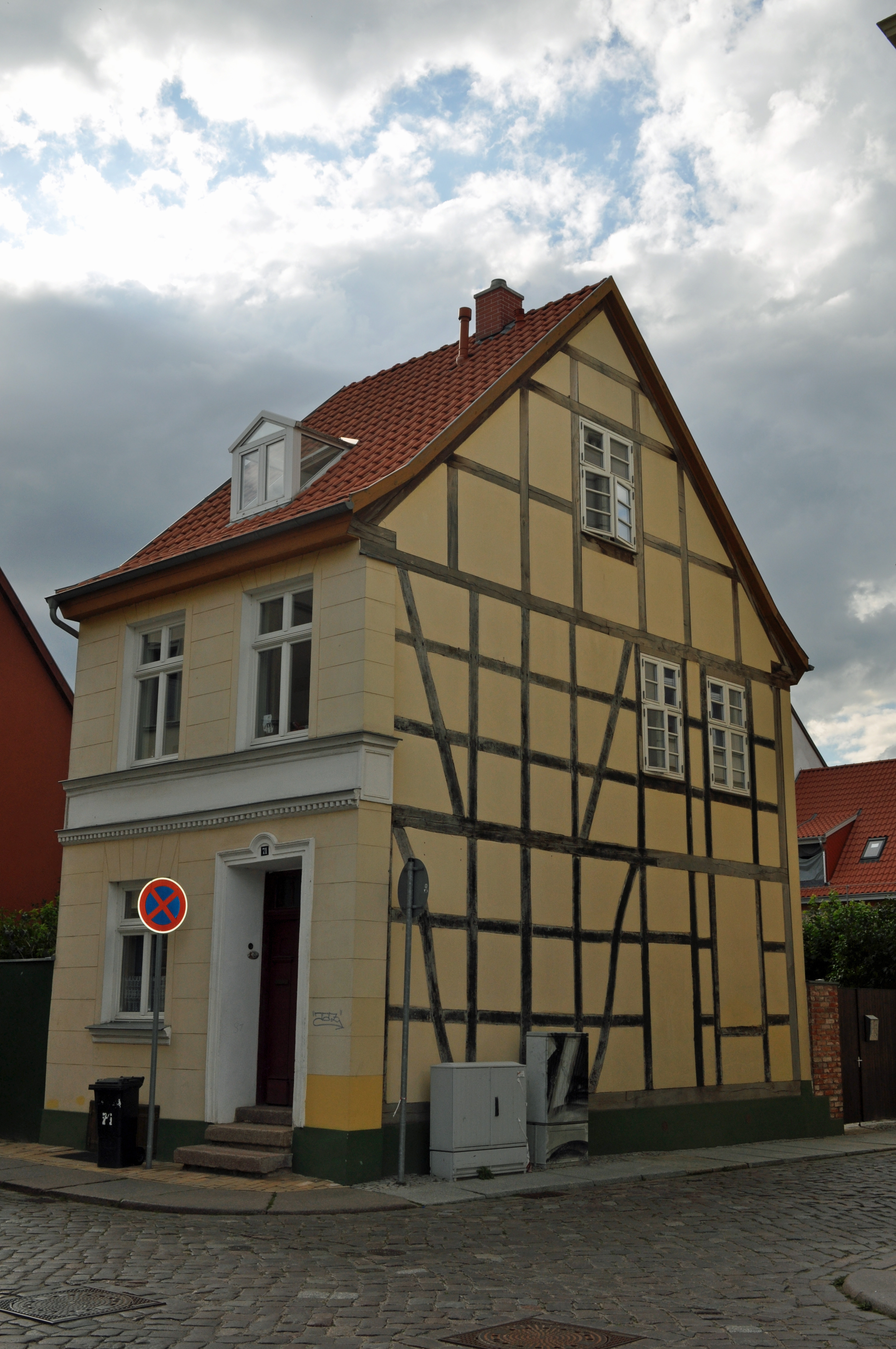 Das Foto zeigt ein Haus (bzw. Details des Hauses) in der Frankenstraße in Stralsund, Deutschland. Die Hausnummer steht im Dateinamen. Aufgenommen am 19. Juli 2011 vom Benutzer:Klugschnacker.